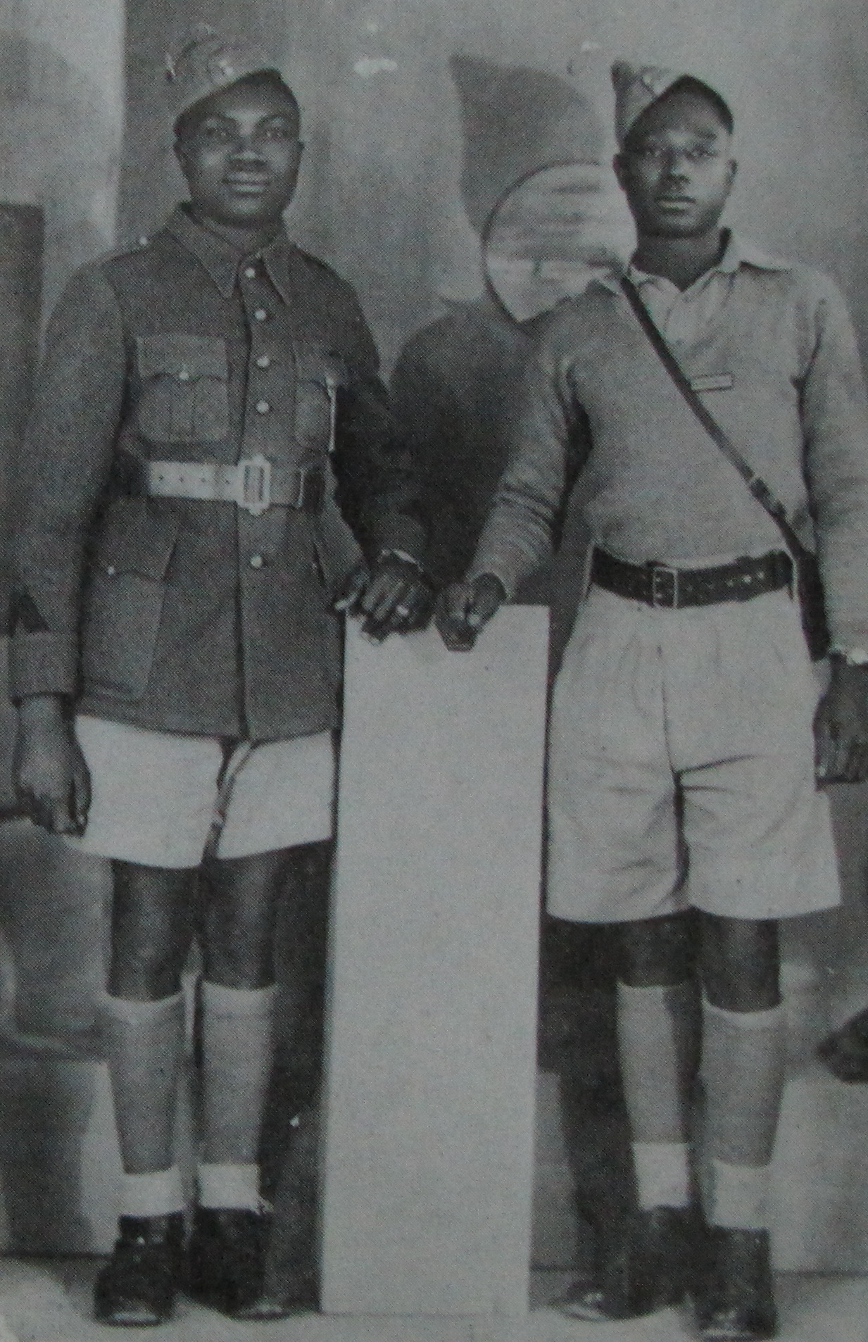 Raphaël Onana à 20 ans en jeune milicien en compagnie d'un camarade.